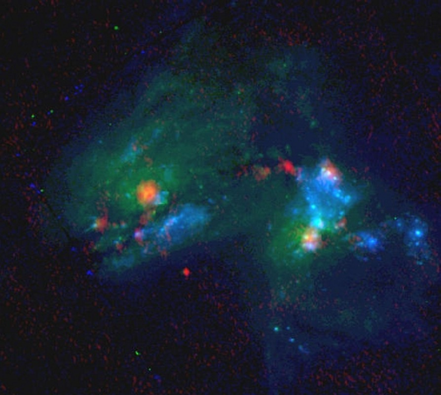 IC 694 (ліворуч) та NGC 3690.